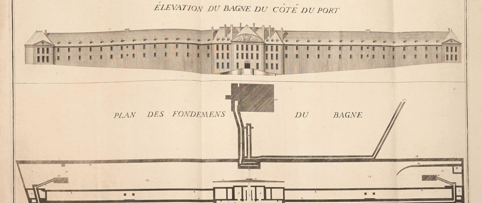 Élévation du bagne [de Brest] du côté du port [et] plan des fondemen[t]s du bagne, grande planche incluse dans l'ouvrage d'Antoine Choquet de Lindu, Description du bagne, pour loger à terre, les galériens ou forçats de l'Arsenal de Brest. Relié à la suite: - Description des trois formes du port de Brest, Brest, Imprimerie de Romain Malassis, 1757-1759, 2 ouvrages en un volume grand in-folio de 4, (3) pp. entièrement gravées ("Renvoi des plans et profils"); 10, (5) pp. et 12 planches. L'auteur, Choquet de Lindu (1712-1790), est un marin et ingénieur brestois qui conçut le bagne de Brest.